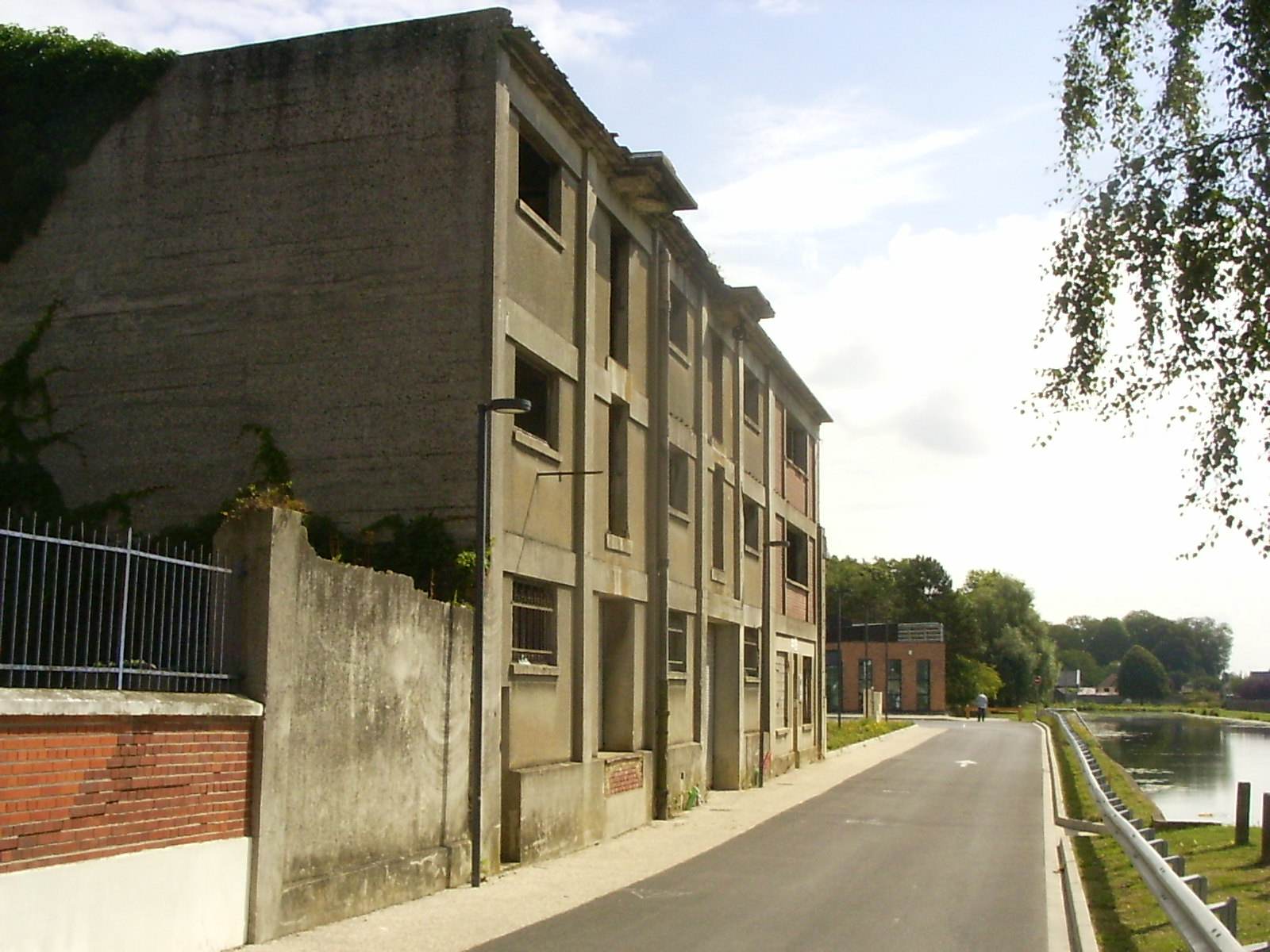 Ham, industieel erfgoed langs het Sommekanaal